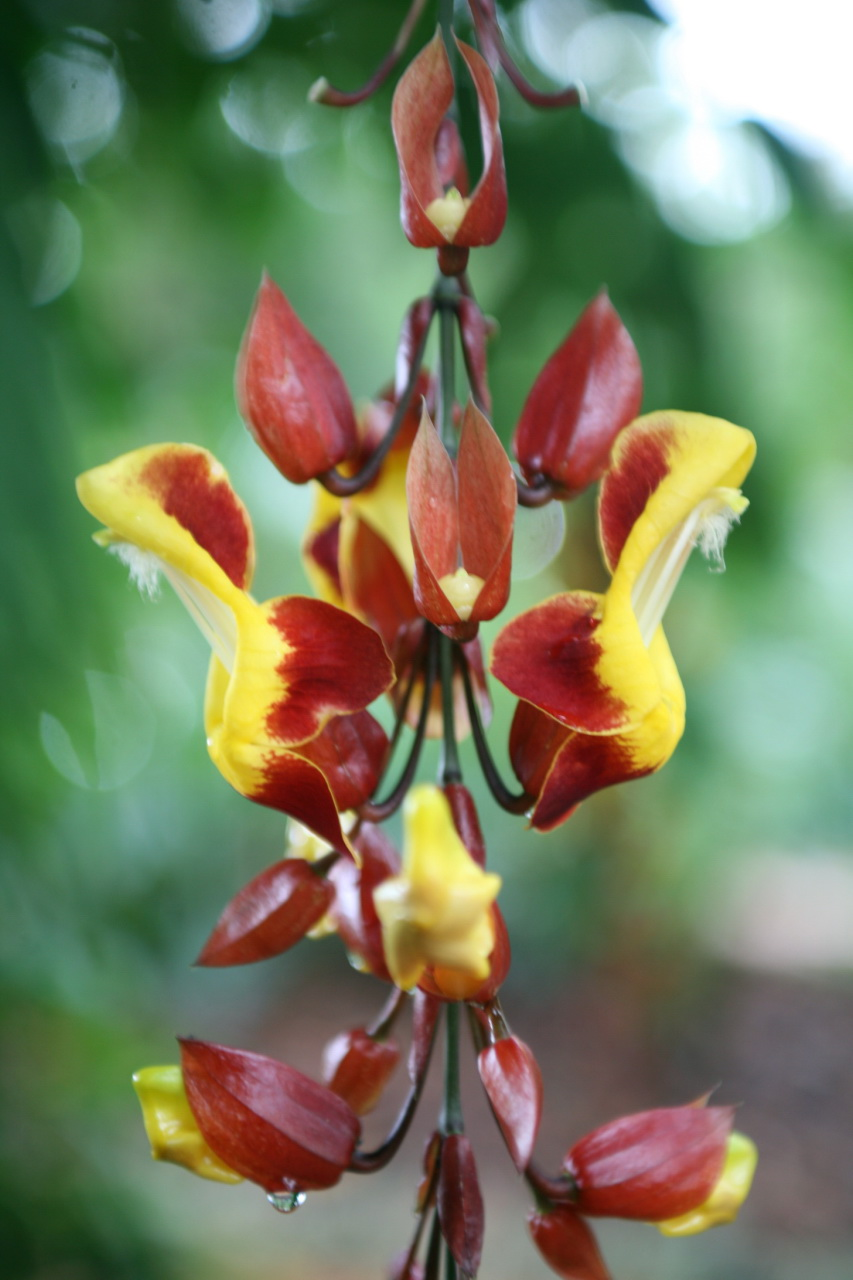 Thunbergia mysorensis